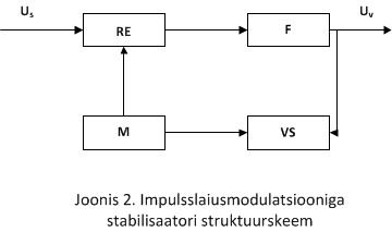 Impulsslaiusmodulatsiooniga stabilisaatori struktuurskeem